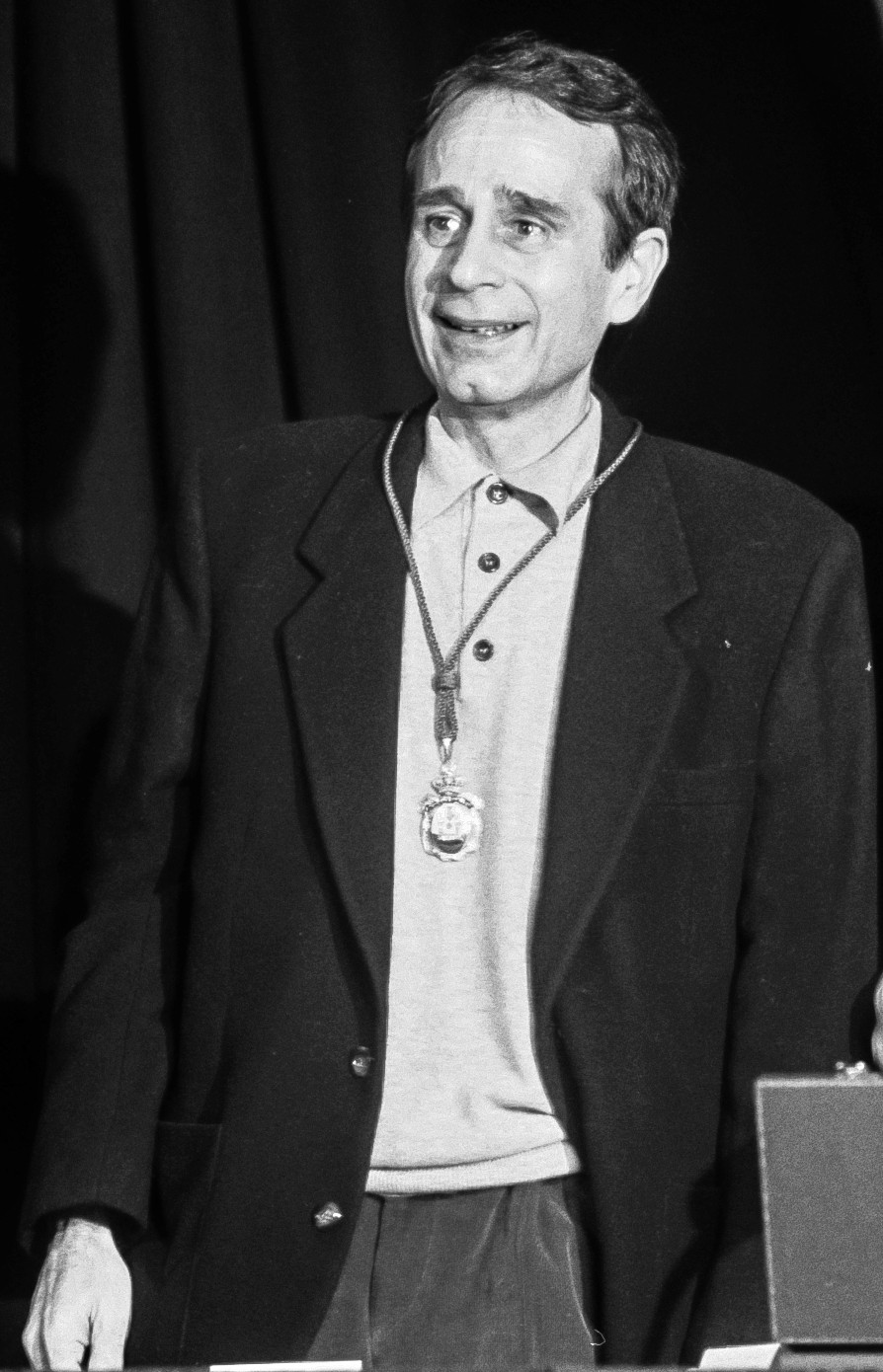 Concesión de la medalla Ciutat d'Alcoi.